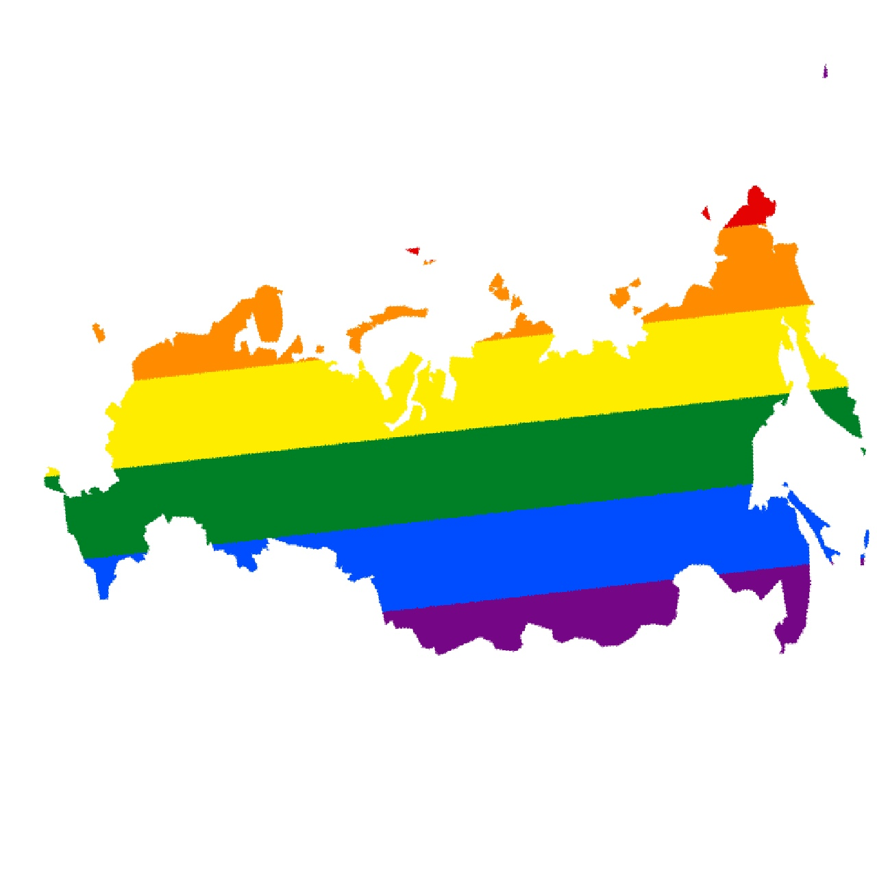 Rusland als regenboogvlag - eigen fabrikaat (Arvey)